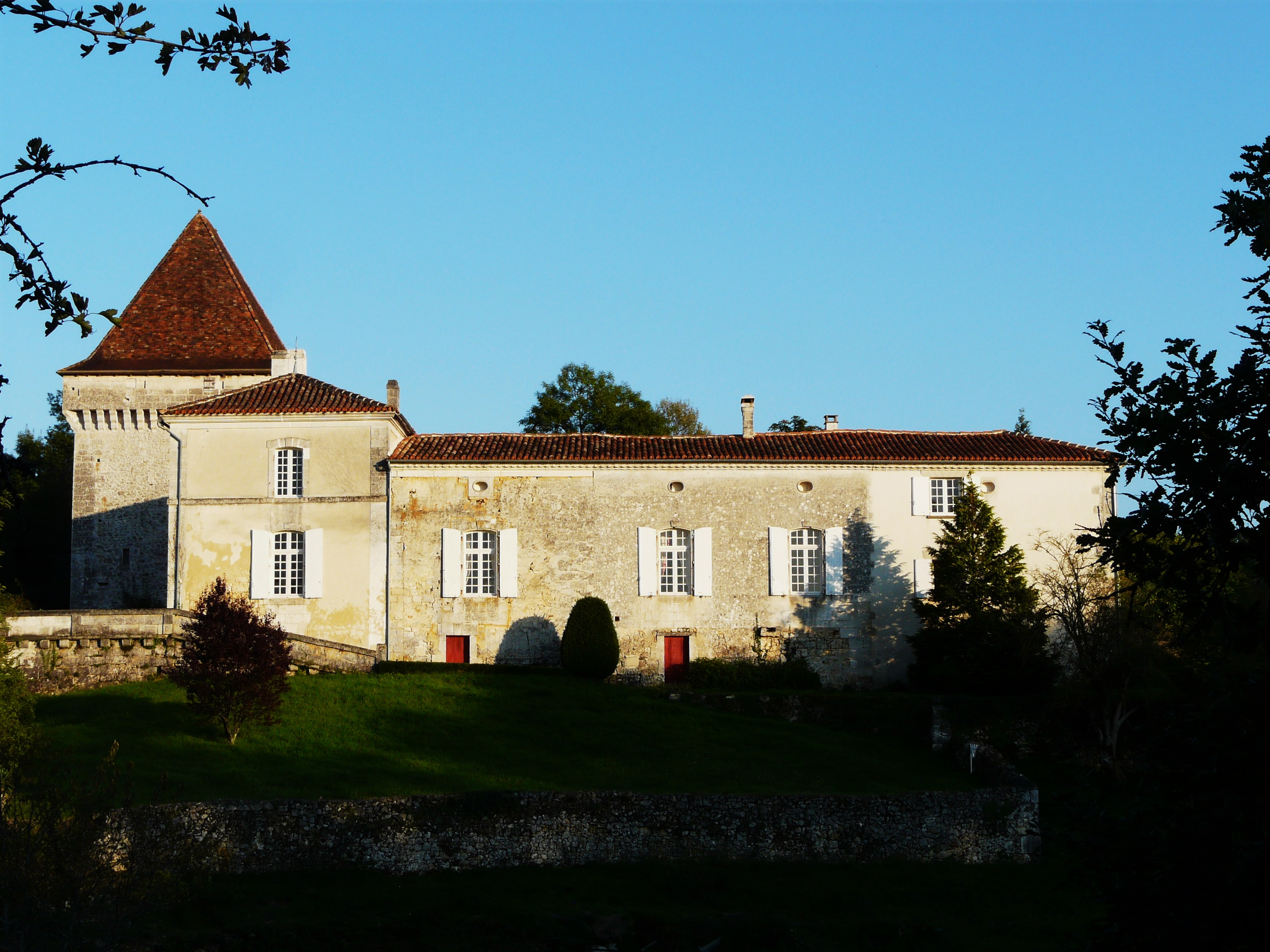 Château de la Vergne, Saint-Sulpice-de-Mareuil, Dordogne, France